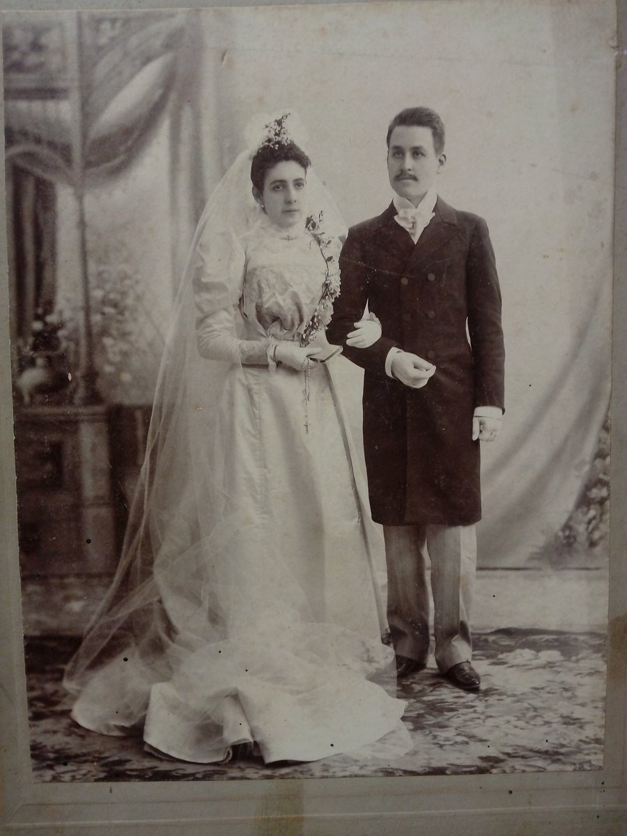 Fotos boda Manuel U y Gertrudis Caraza